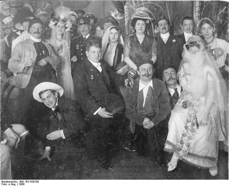 Berlin, Otto Reutter bei Winterfest Zentralbild Vom Winterfest der Schlaraffia-Berolina im Jahre 1908 UBz: (1) Hofschauspieler Dehnike, (2) Baron von Bretfeld, der Führer des Oesterreichischen Lloyddampfers "Thalia", (3) Otto Reutter. Abgebildete Personen: Reutter, Otto: Vortragskünstler, Humorist, Deutschland